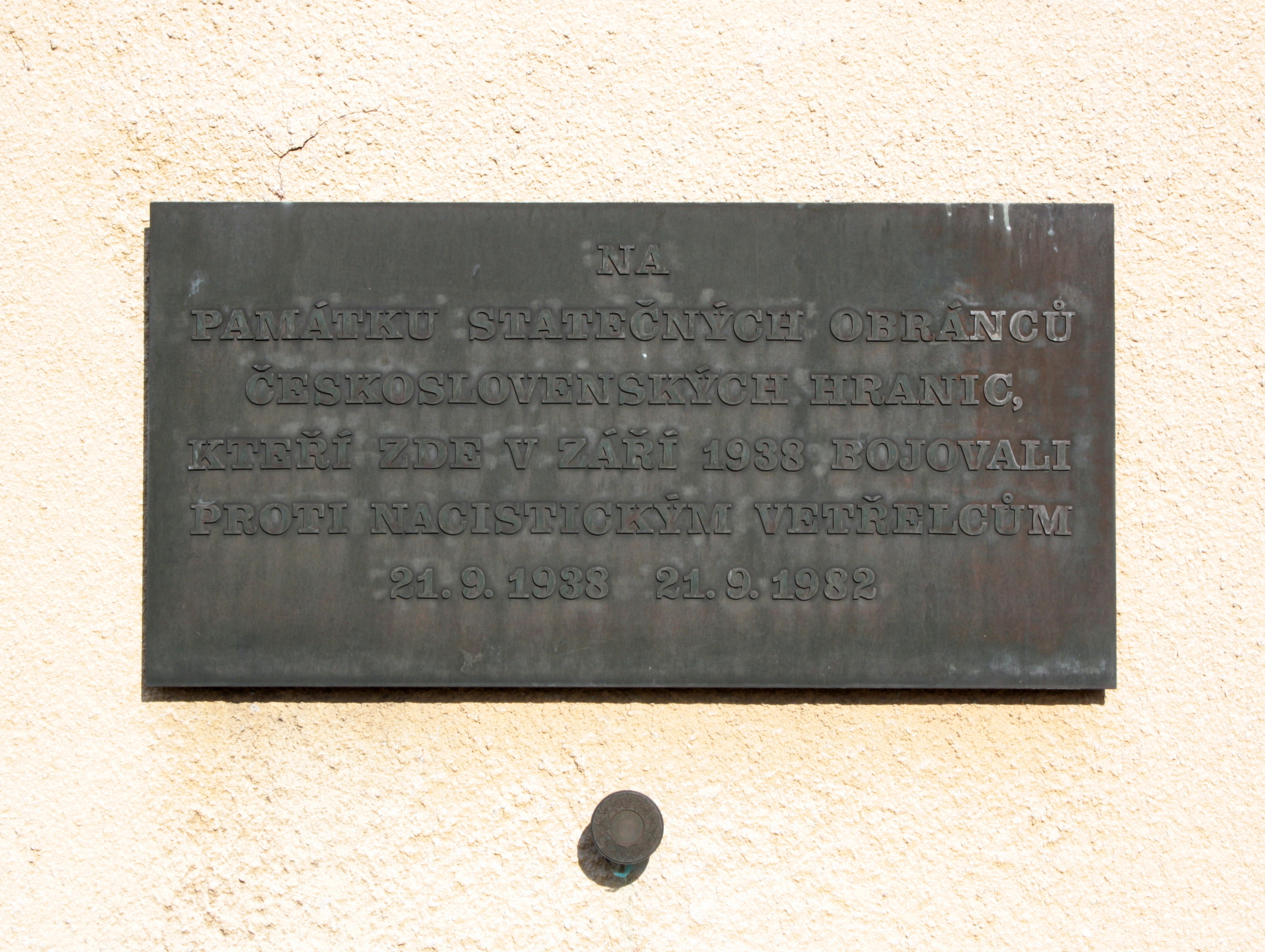 This photograph was taken with a DSLR from WMCZ's Camera grant. Pamětní deska na domě číslo popisné 32 v Habarticích v okrese Liberec (umístěná vedle vstupních dveří do objektu).